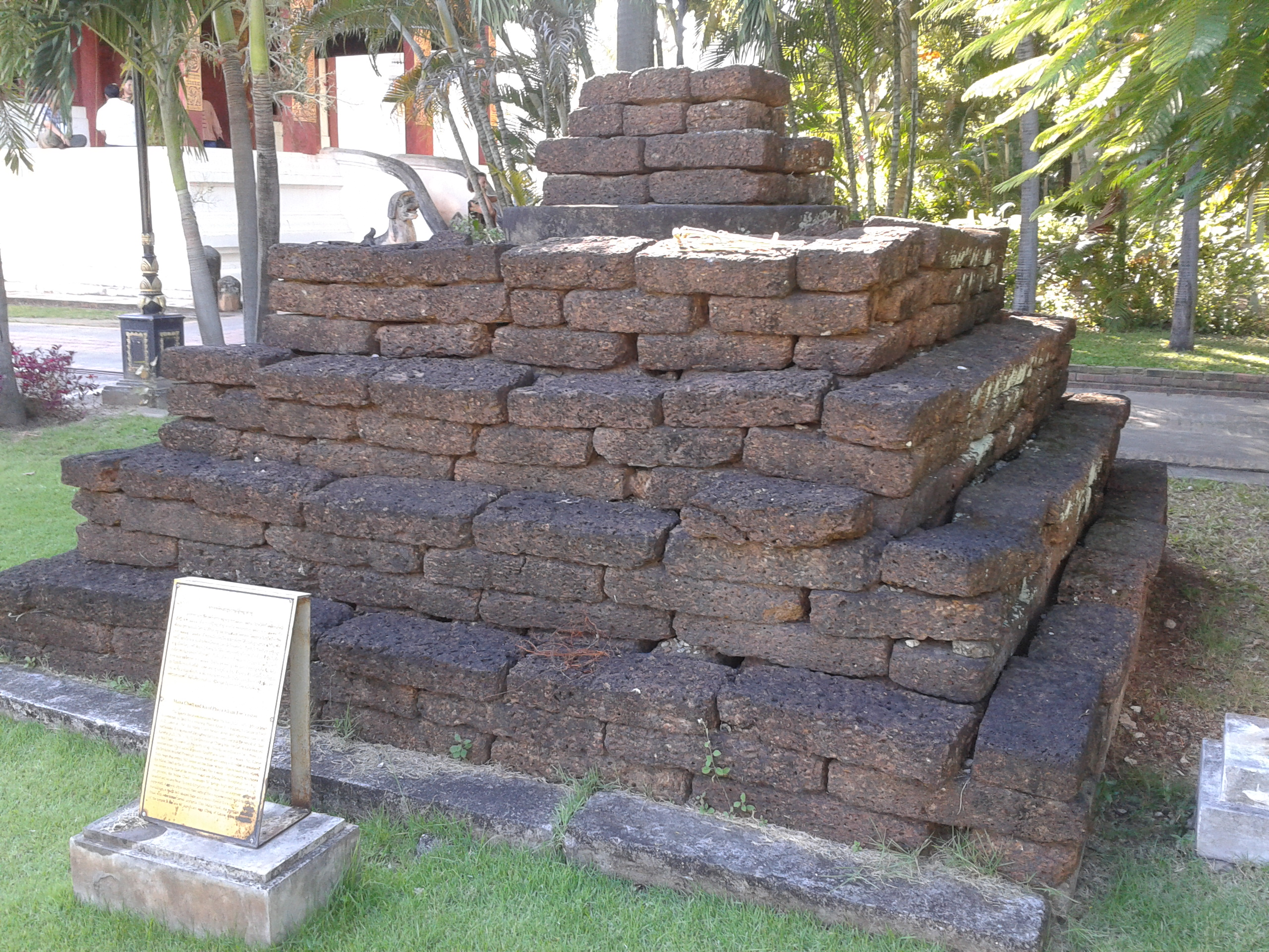 กู่บรรจุพระบรมอัฐิ พญาคำฟู อดีตกษัตริย์แห่งอาณาจักรล้านนา